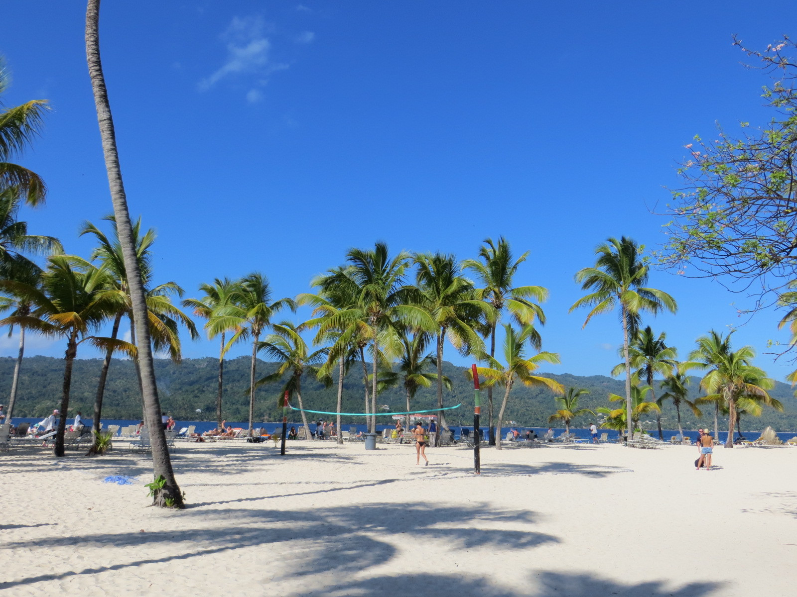 República Dominicana